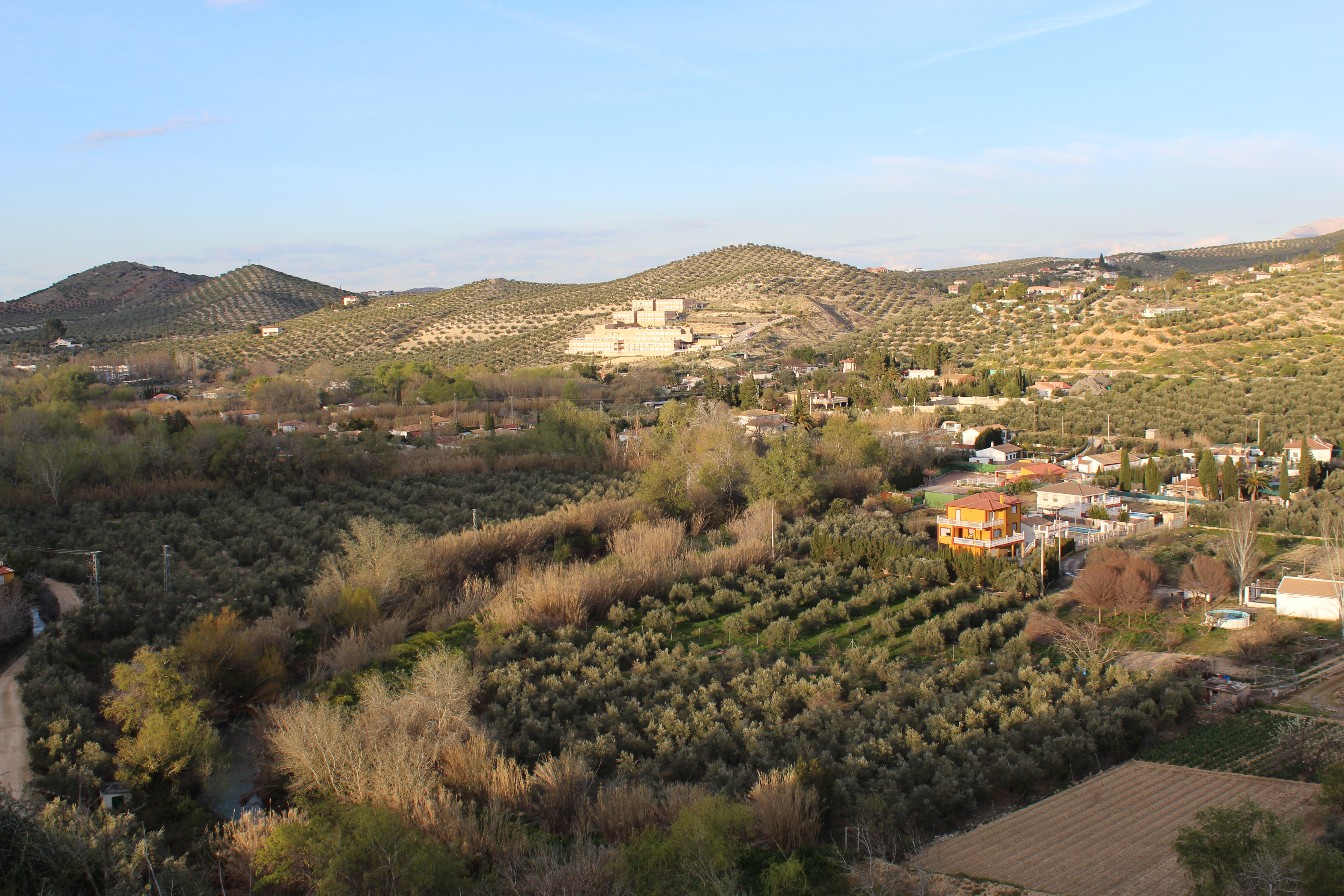 Vista general del Puente Jontoya y de la residencia Altos del Puente Nuevo.